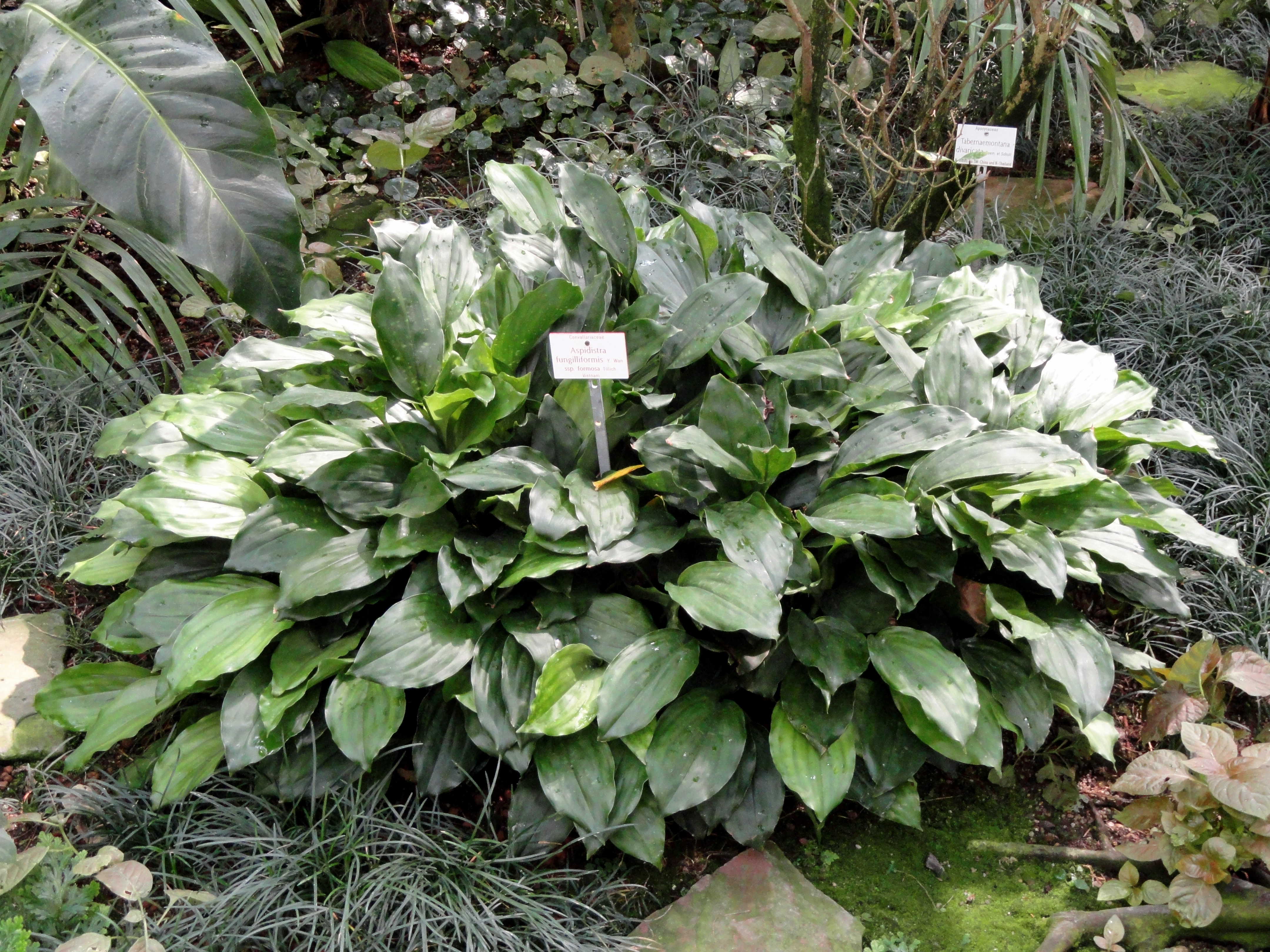 Aspidistra fungilliformis specimen in the Botanischer Garten München-Nymphenburg, Munich, Germany.